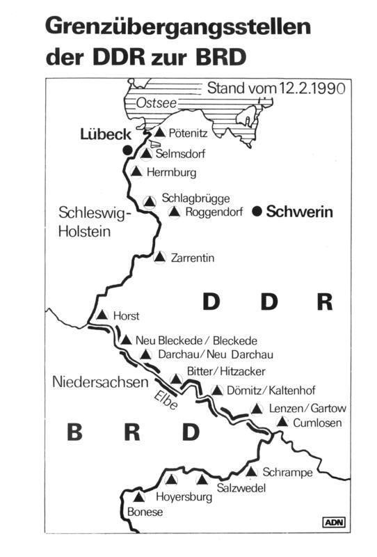 ADN-ZB-Grafik-15.2.90-roe-Berlin: Die Grenzübergänge zwischen der DDR und der BRD nach Schleswig-Holstein und dem nördlichen Teil Niedersachsens.